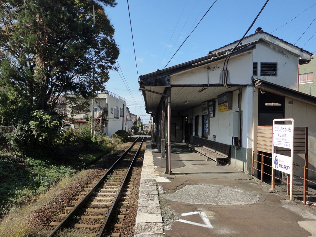 富山地方鉄道本線 東三日市駅 ホーム